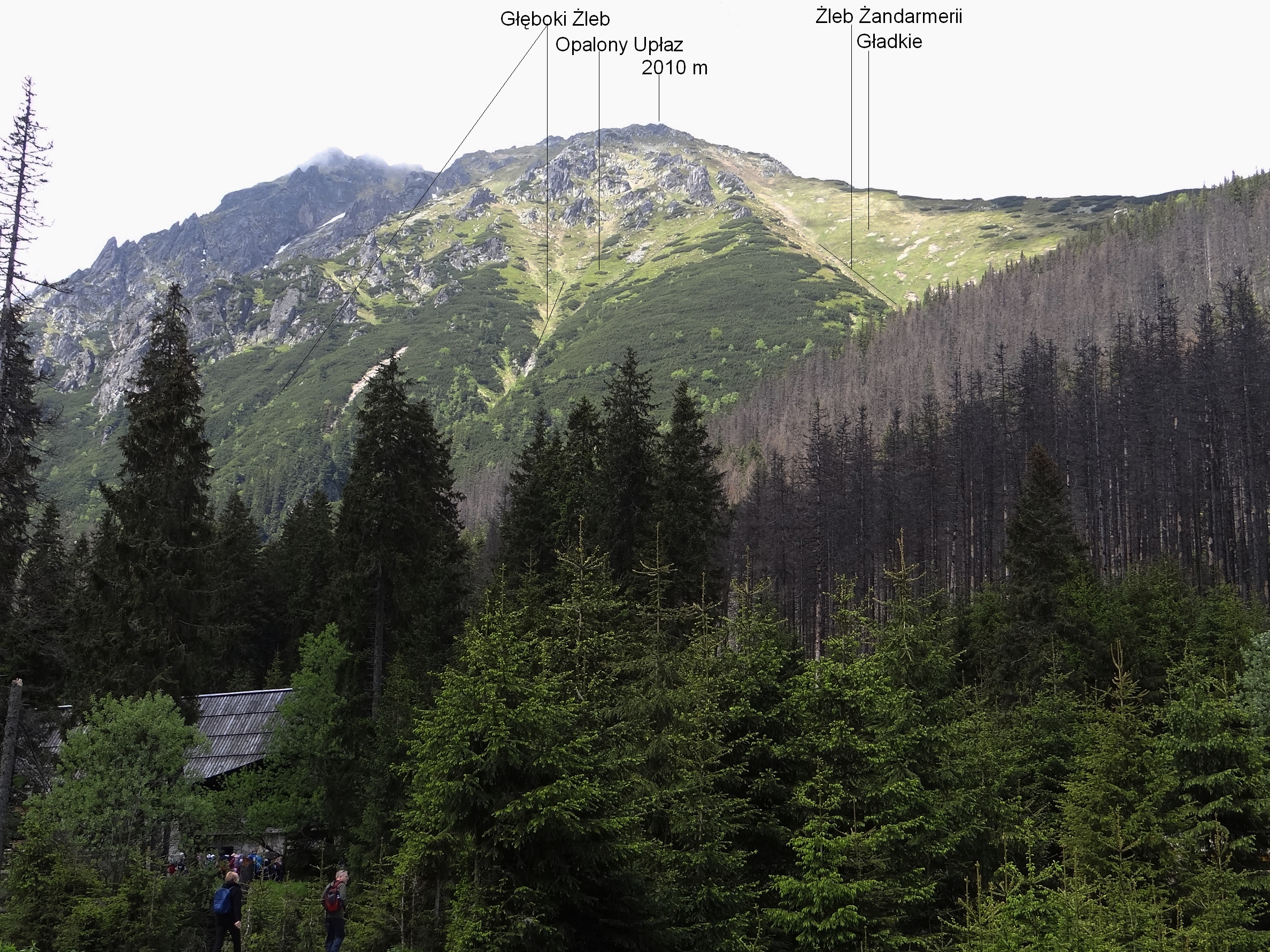 Widok z polany Wlosienica